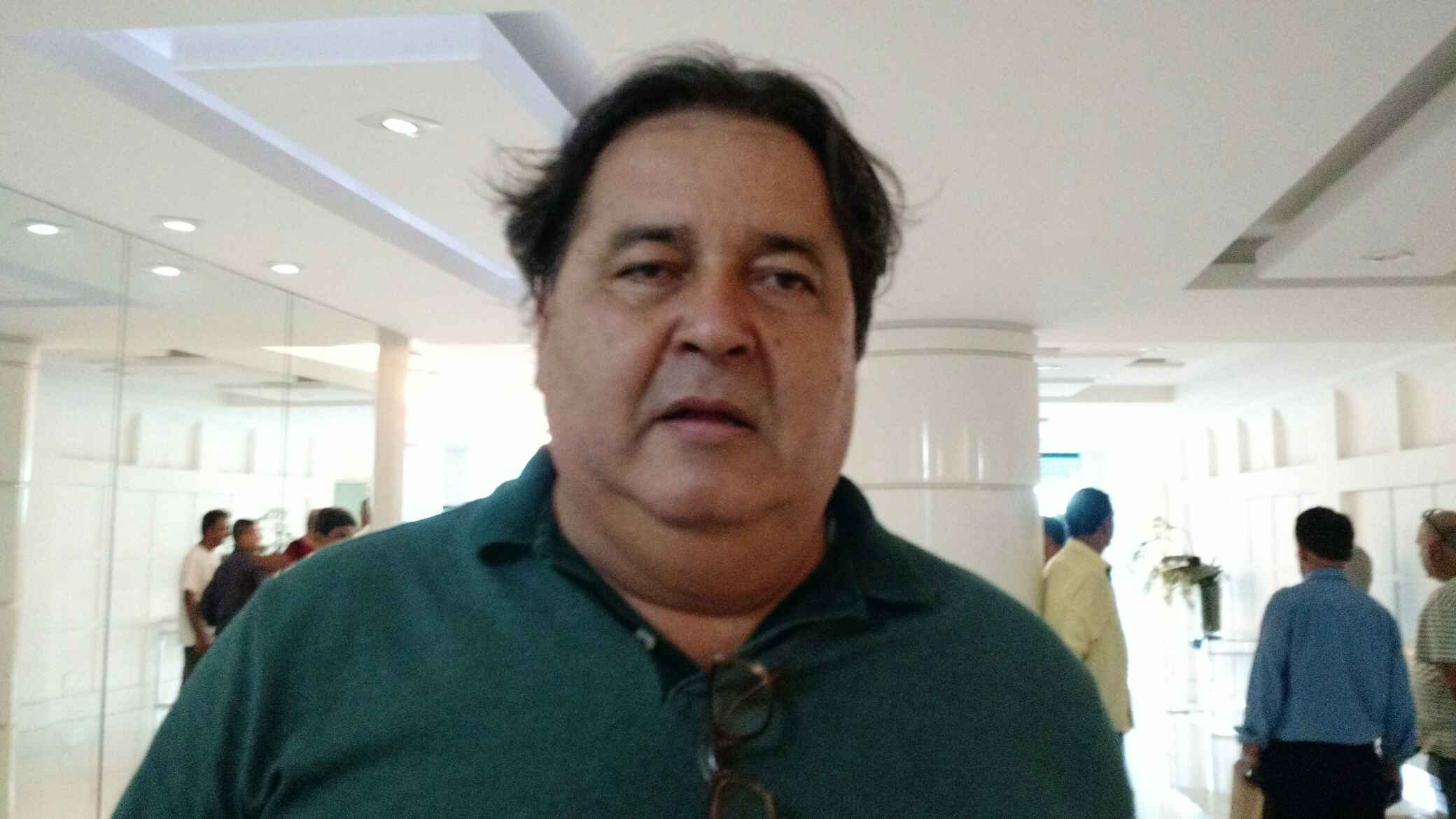 Nelri Ferreira Leite, presidente do 7 de Abril